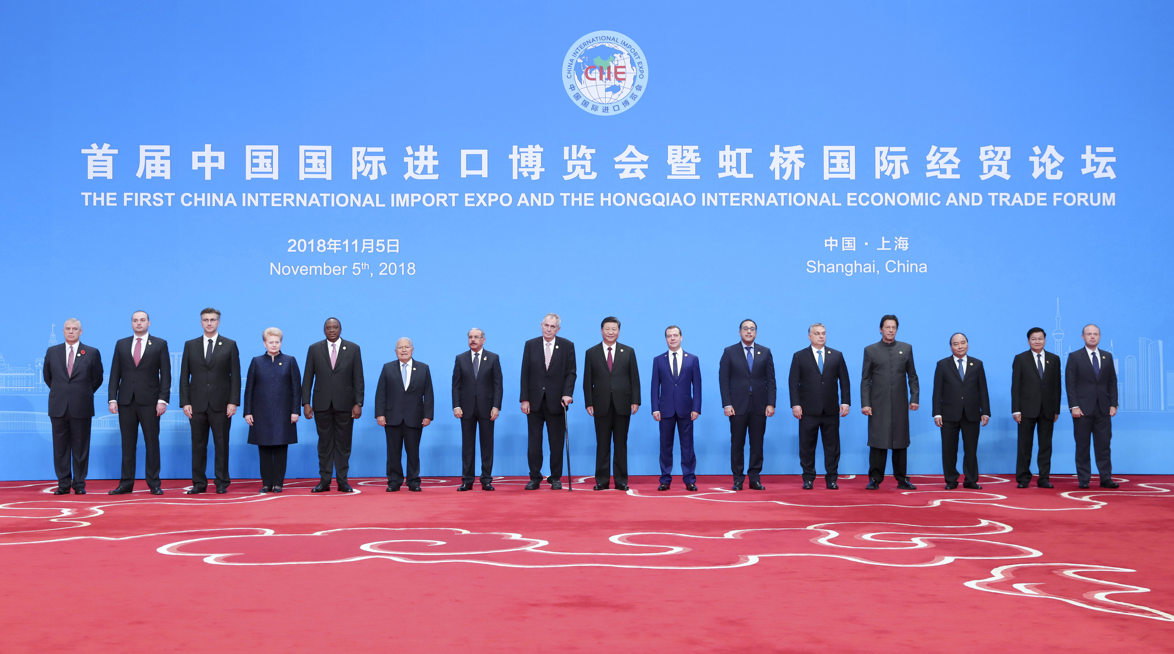 CORTESIA DE AGENCIA DE NOTICIAS XINHUA